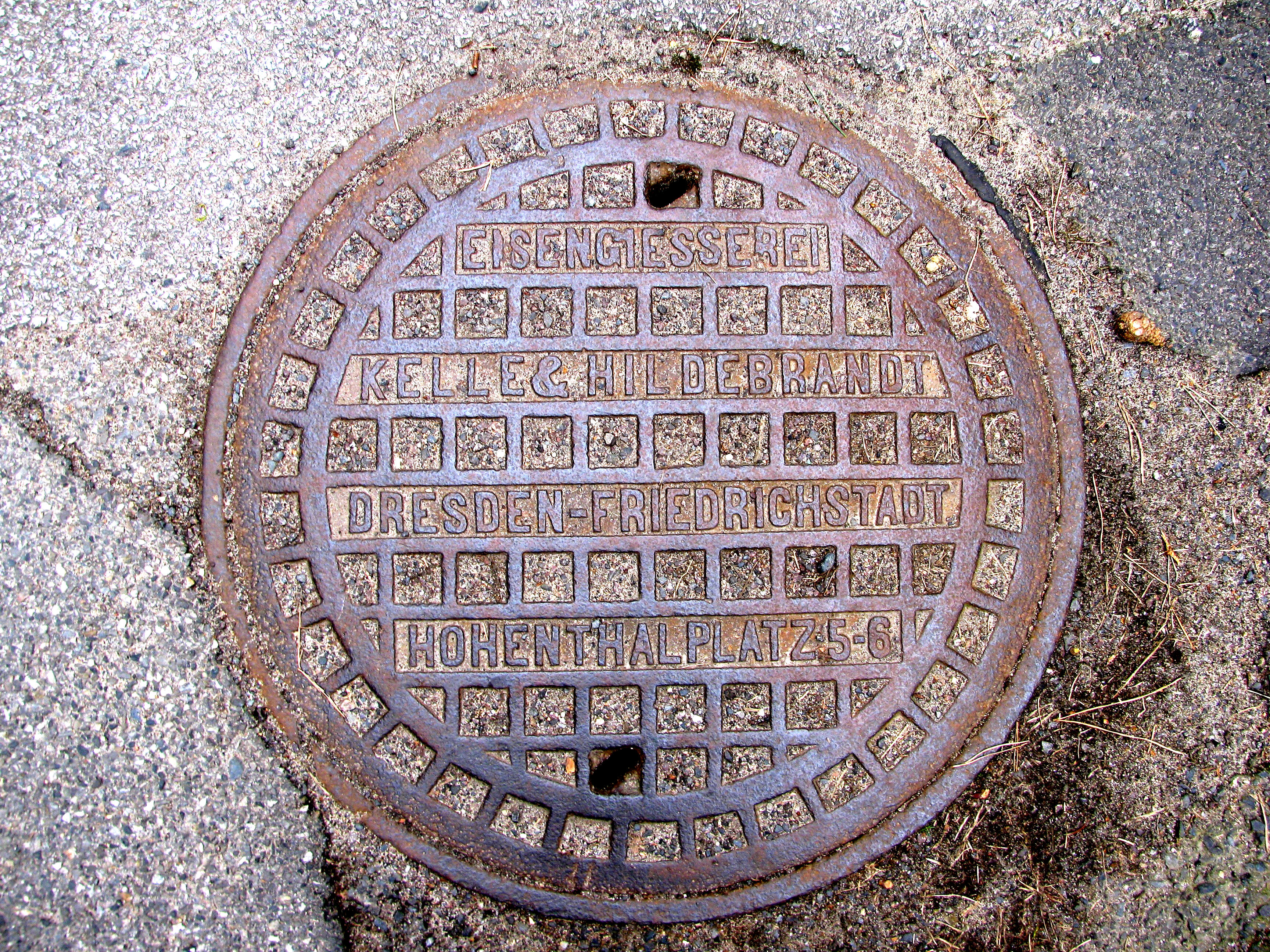 Schachtdeckel auf einer Straße in Dresden-Hellerau, hergestellt bei der Eisengießerei Kelle & Hildebrandt in Dresden-Friedrichstadt, Hohenthalplatz 5/6